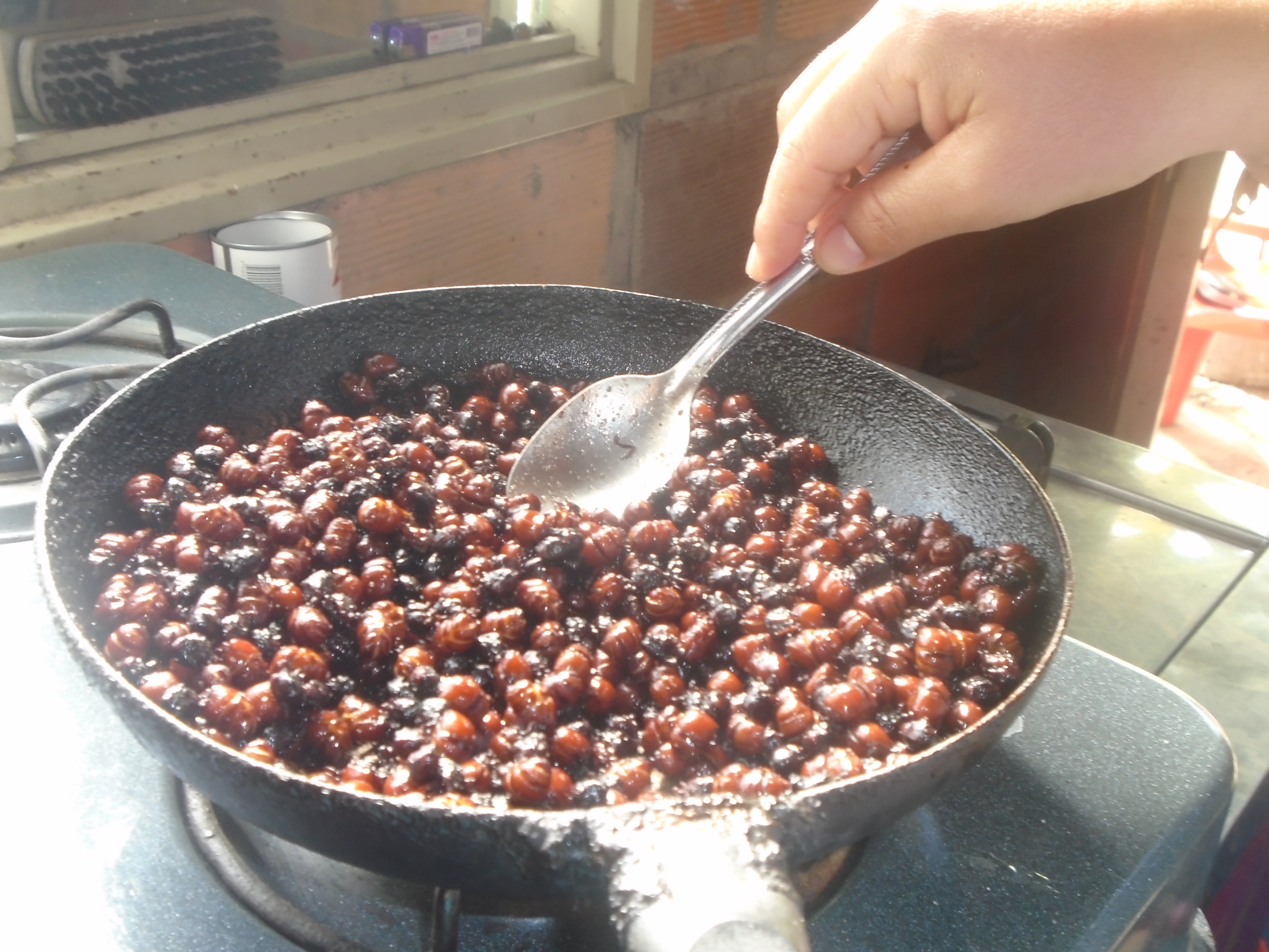 Una chef batiendo las hormigas culonas en una caserola.